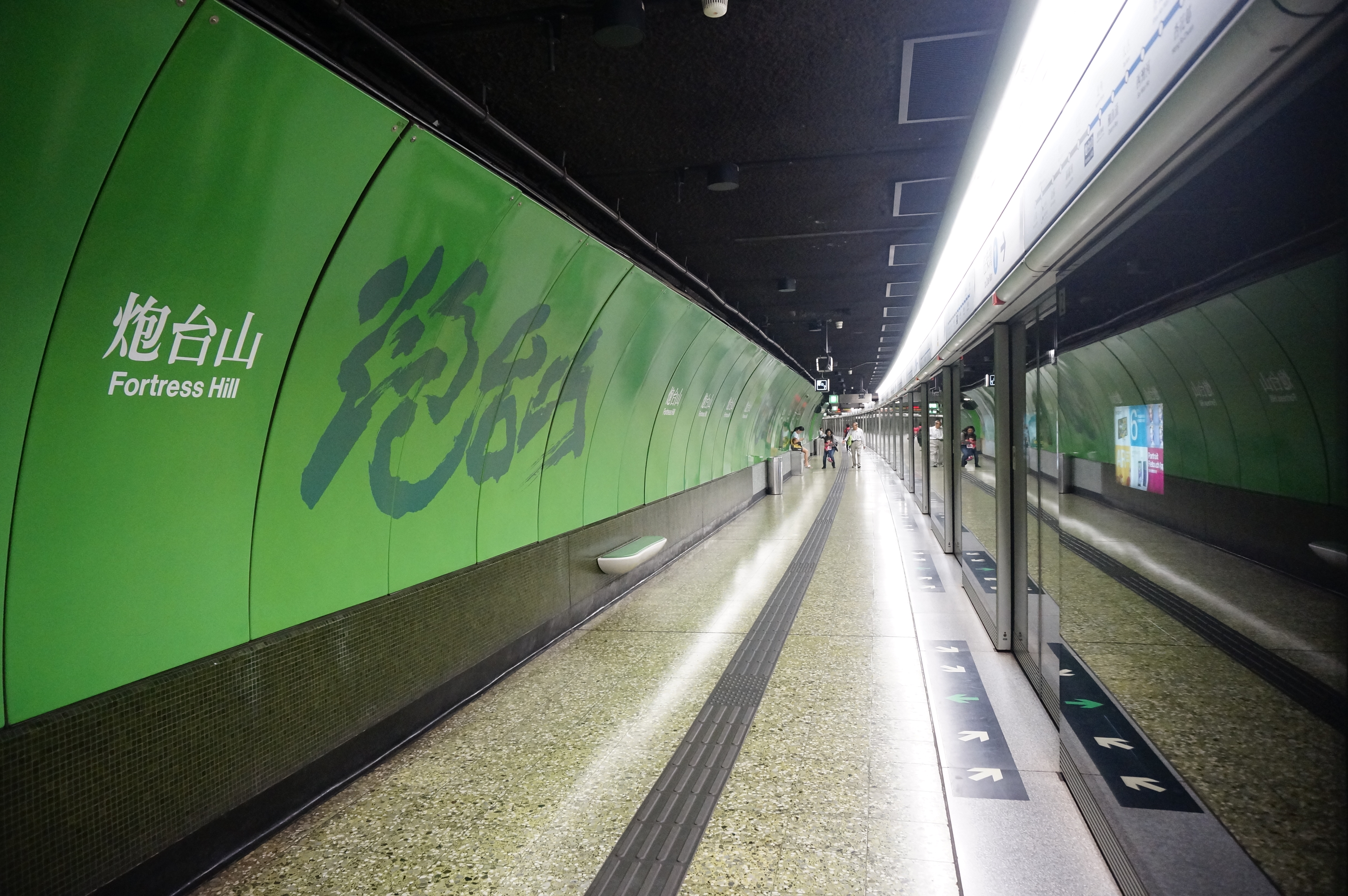 港鐵炮台山站月台